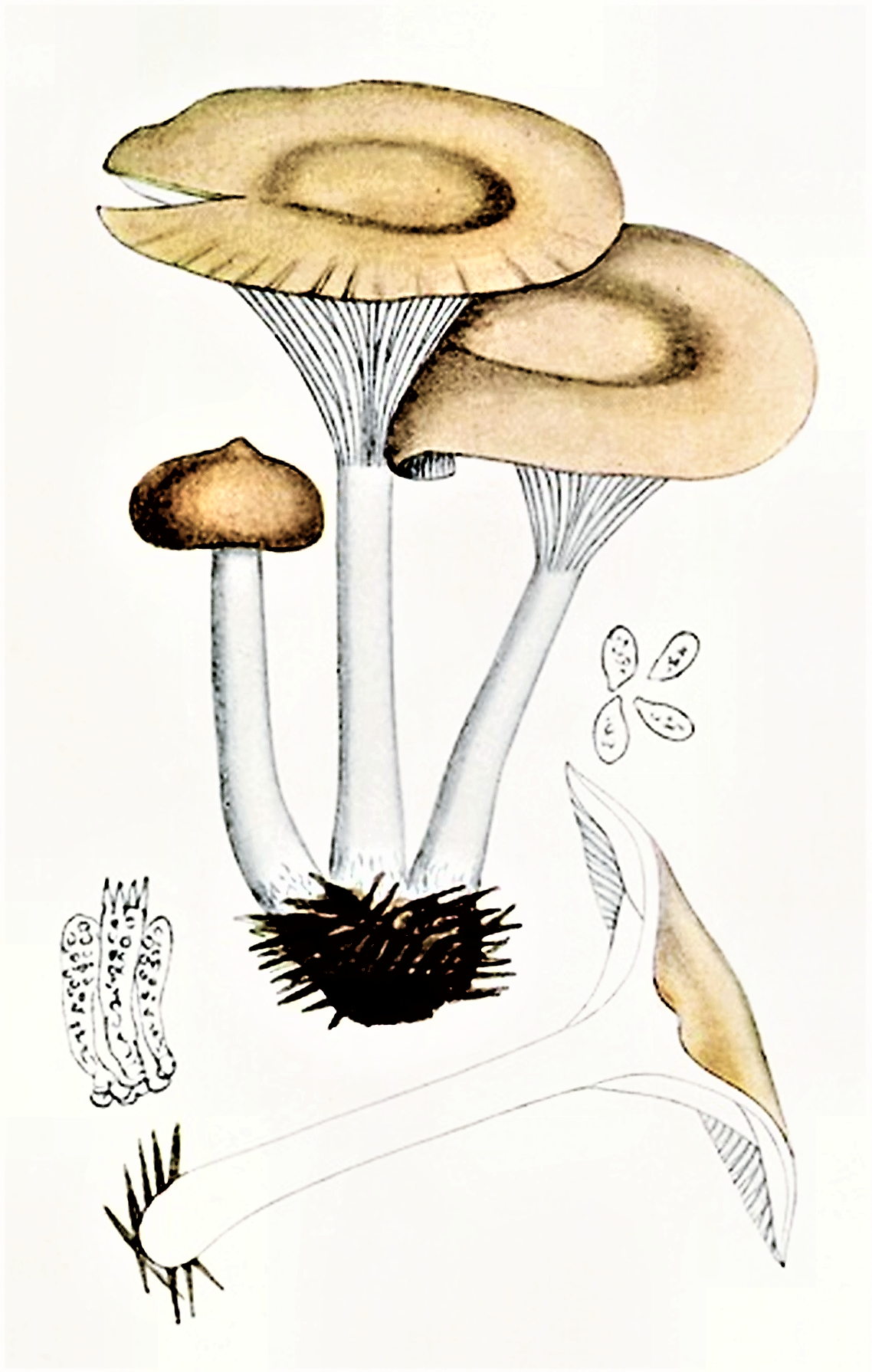 Giacomo Bresadola: Clitocybe infundibuliformis (Schaeff., 1774) Quél. (1872), heute Infundibulicybe gibba (Pers., 1801) Harmaja (2003), oft auch noch Clytocybe gibba (Pers., 1801) P.Kumm. (1871)